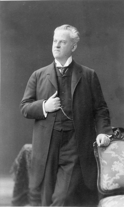 Dr. Riesser Geheimer Justizrat 16587